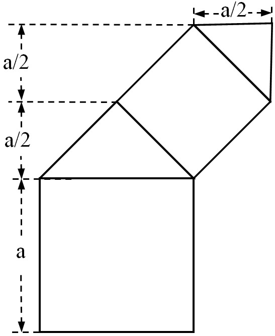 Ast eines Pythagorasbaumes